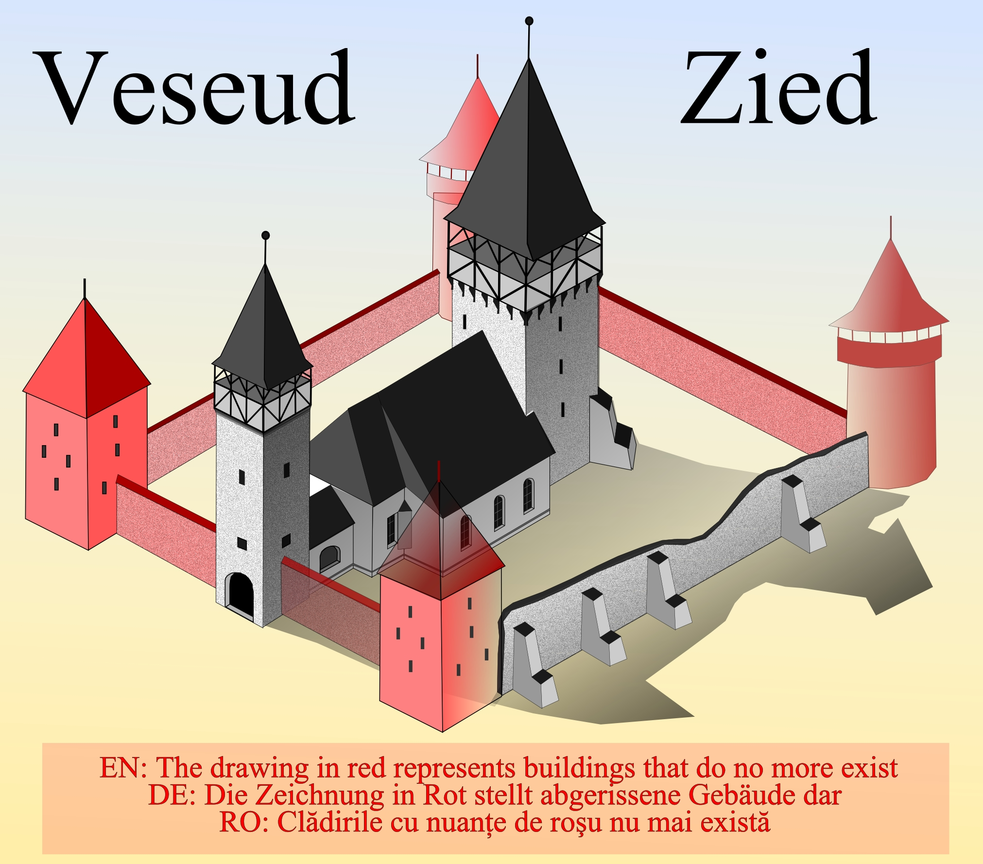 Color, Biserica fortificata din Veseud.